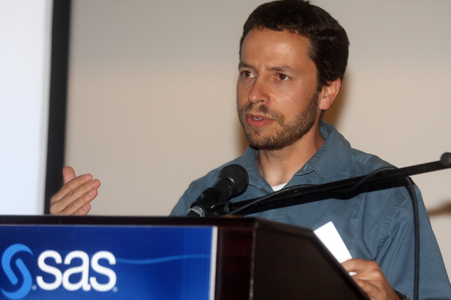 יצחק דבירה ארכאולוג ישראלי יוזם פרויקט סינון עפר הר הבית יחד עם ד"ר גבריאל ברקאי